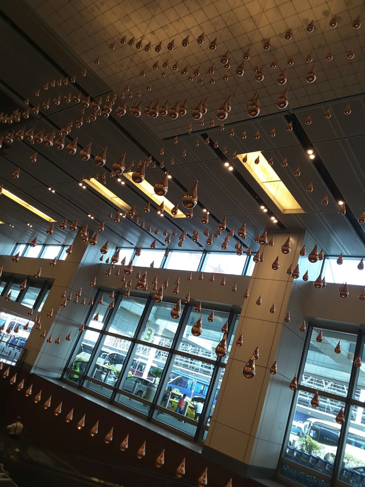 Satu Terminal Lapangan Terbang Changi.